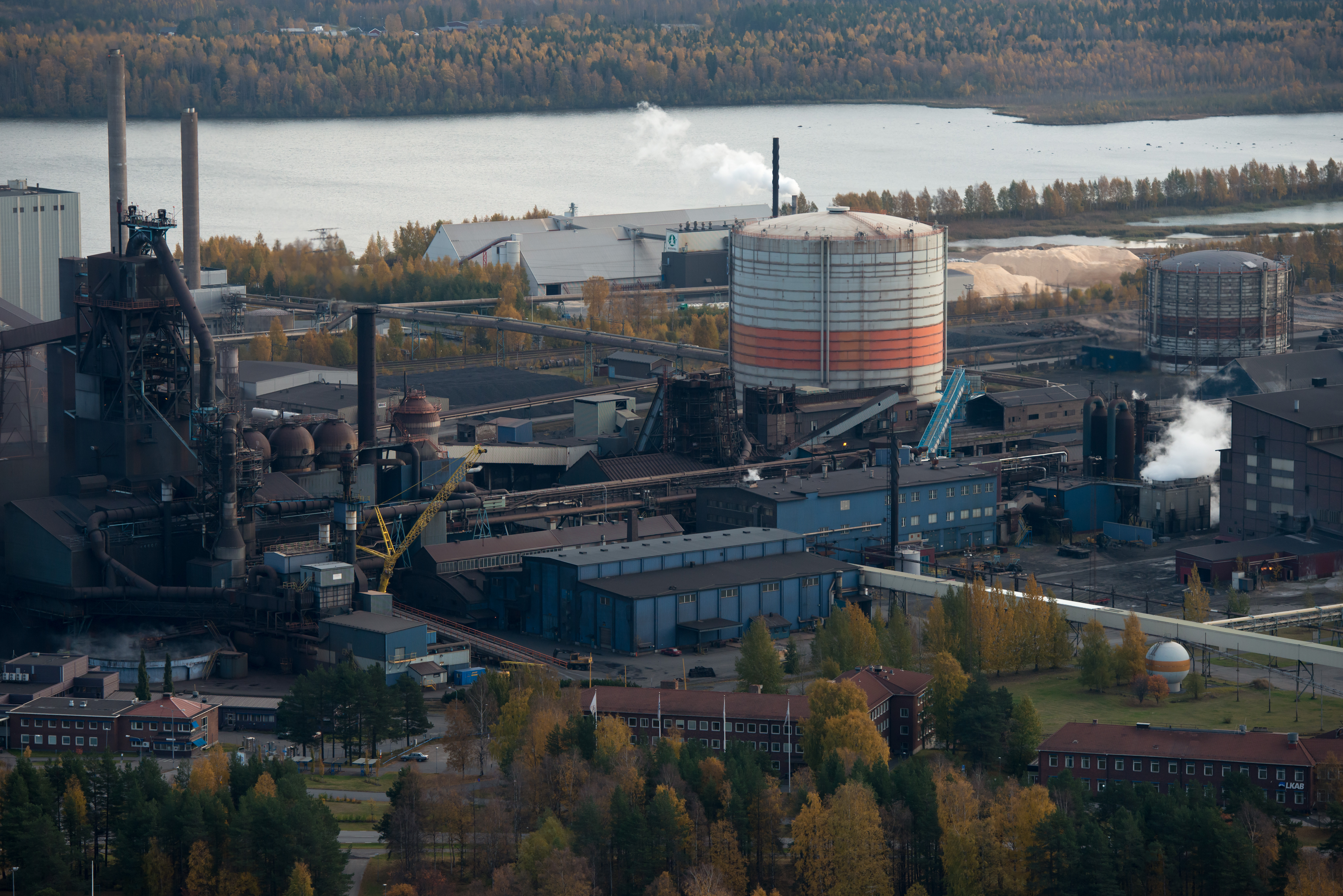 Masugn 3 till vänster i bild, den delvis nedmonterade Masugn 1 i mitten samt den stora gasklockan snett bakom, till höger om Masugn 1 vid SSAB.